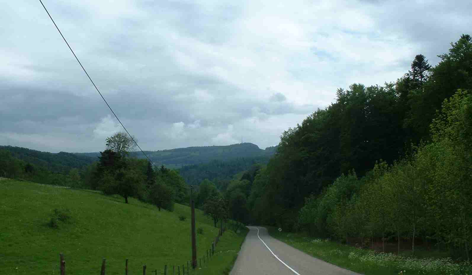 Vue sur les Ordons (les Rangiers) dans le massif du Jura, Suisse, canton du Jura. Photo: Serge NUEFFER